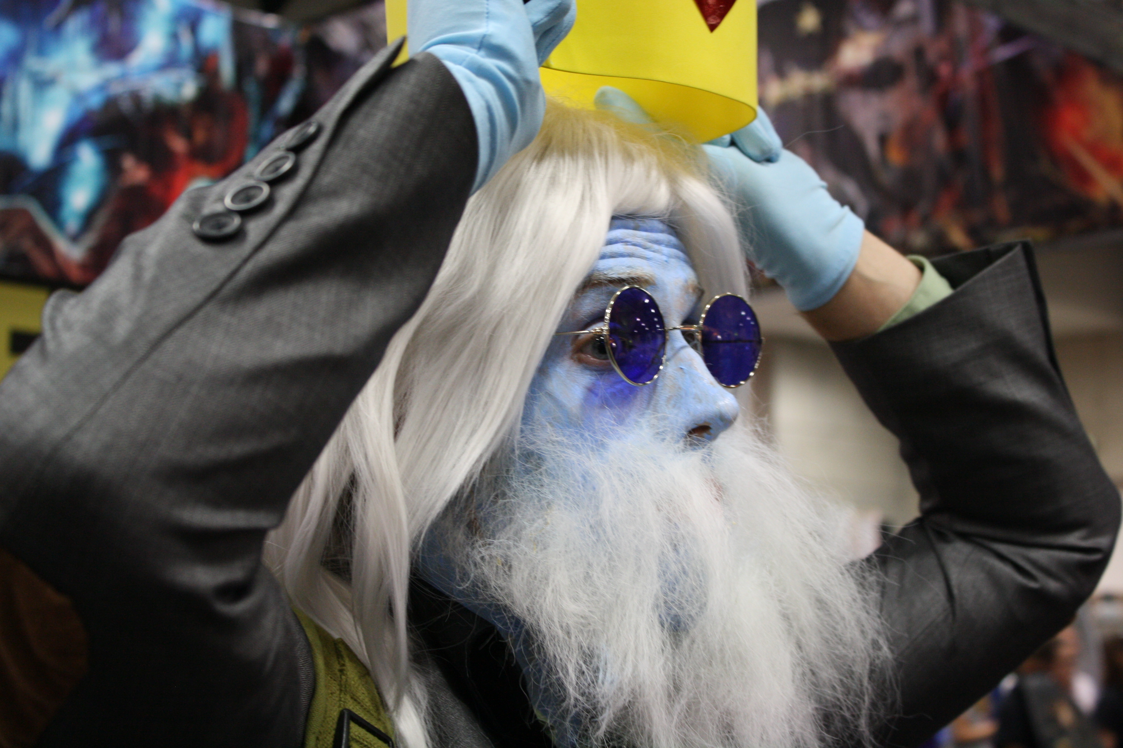 San Diego Comic-Con 2014